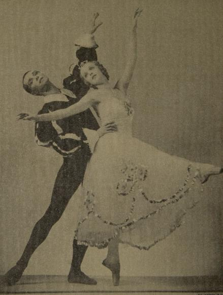 Lucia Nifontova (1913–1987) & Arvo Martikainen (1905–1946); Tshaikovski: Prinsessa Ruusunen 1938